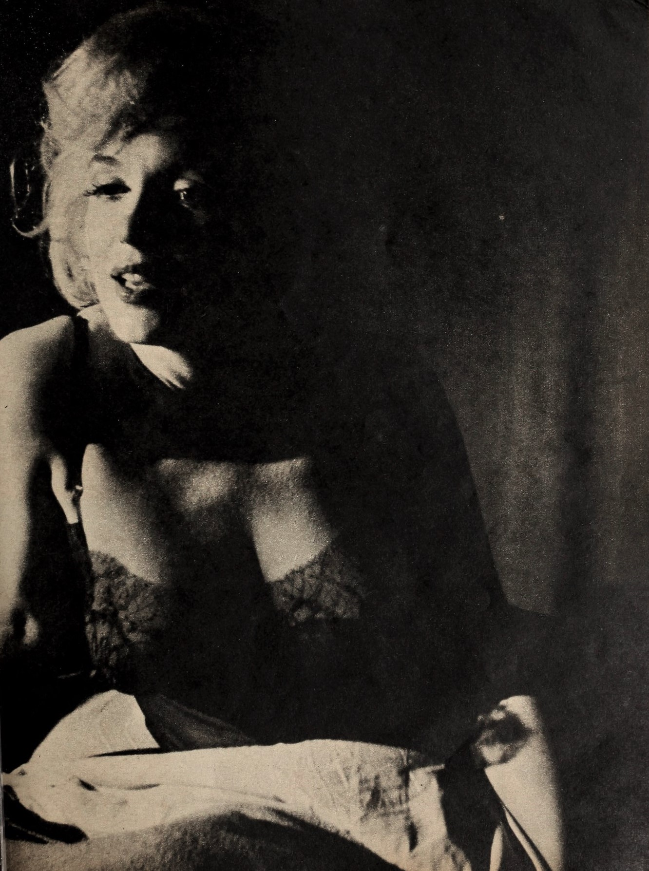 Marilyn Monroe by Zinn Arthur, March 1959